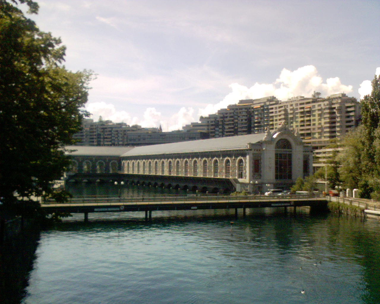 Bâtiment et passerelle des Forces motrices à Genève (Suisse)